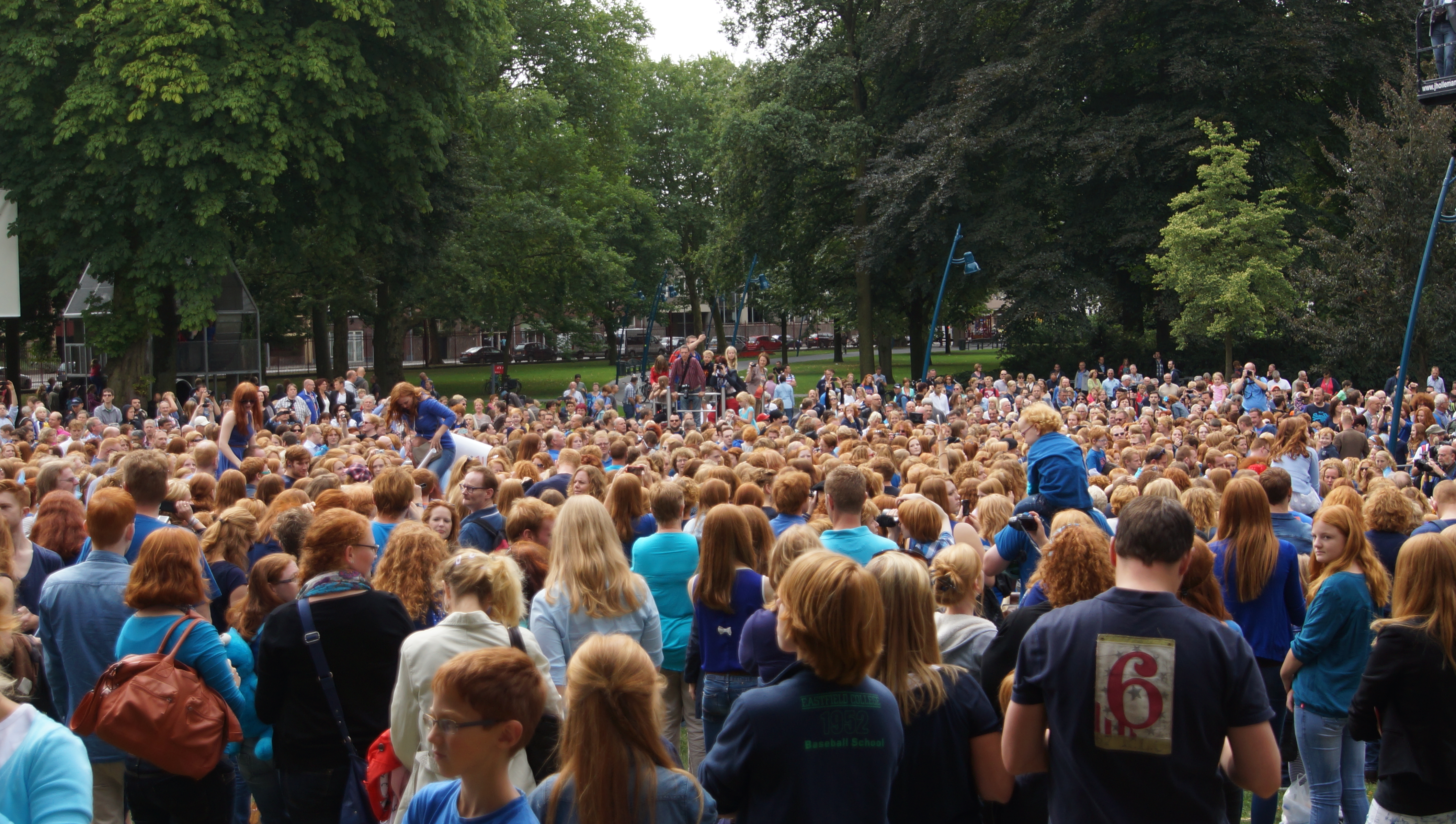 Gruppenfoto Redheaddays 2013